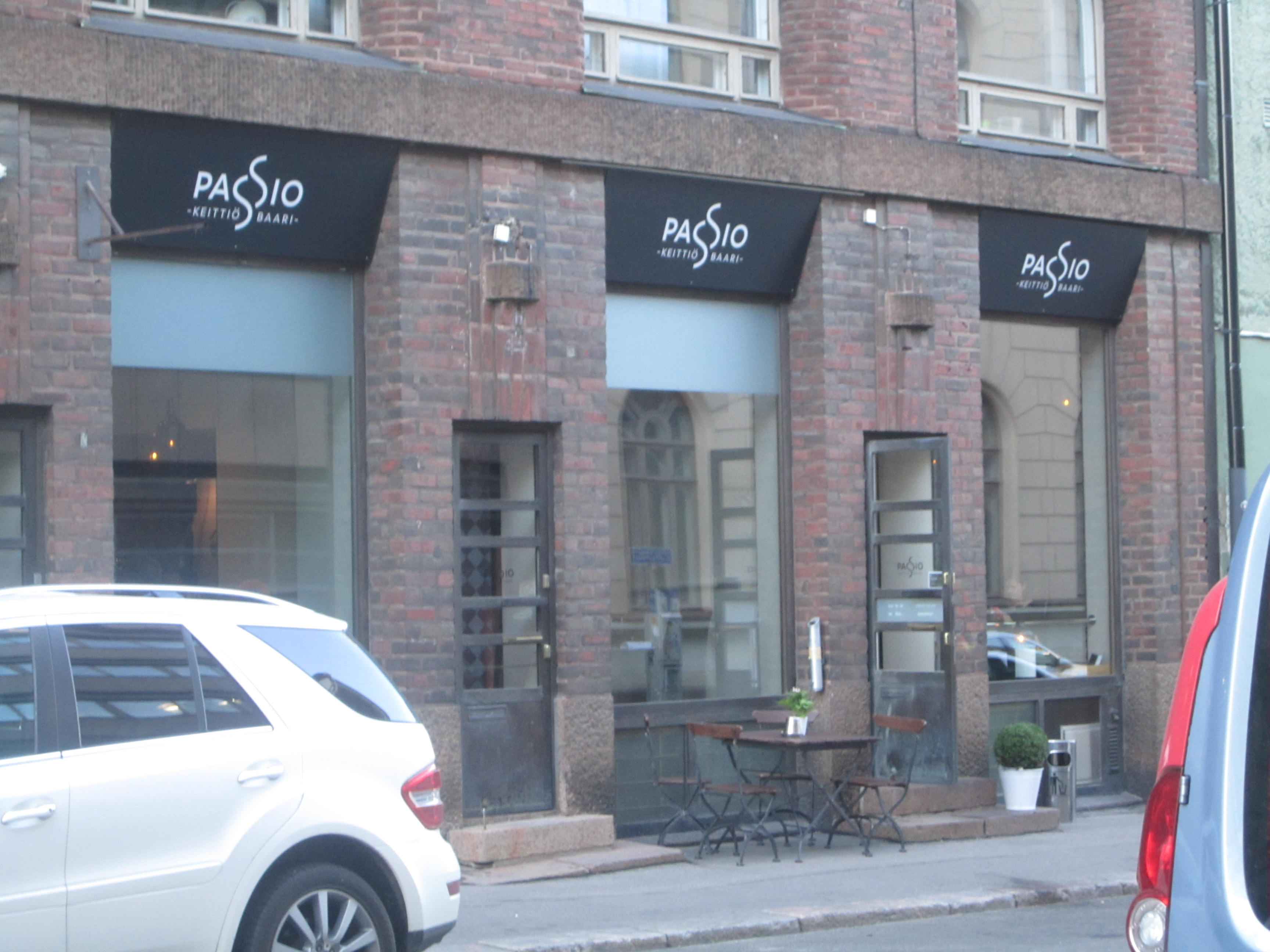 Ravintola Passio Helsingin Kampissa.